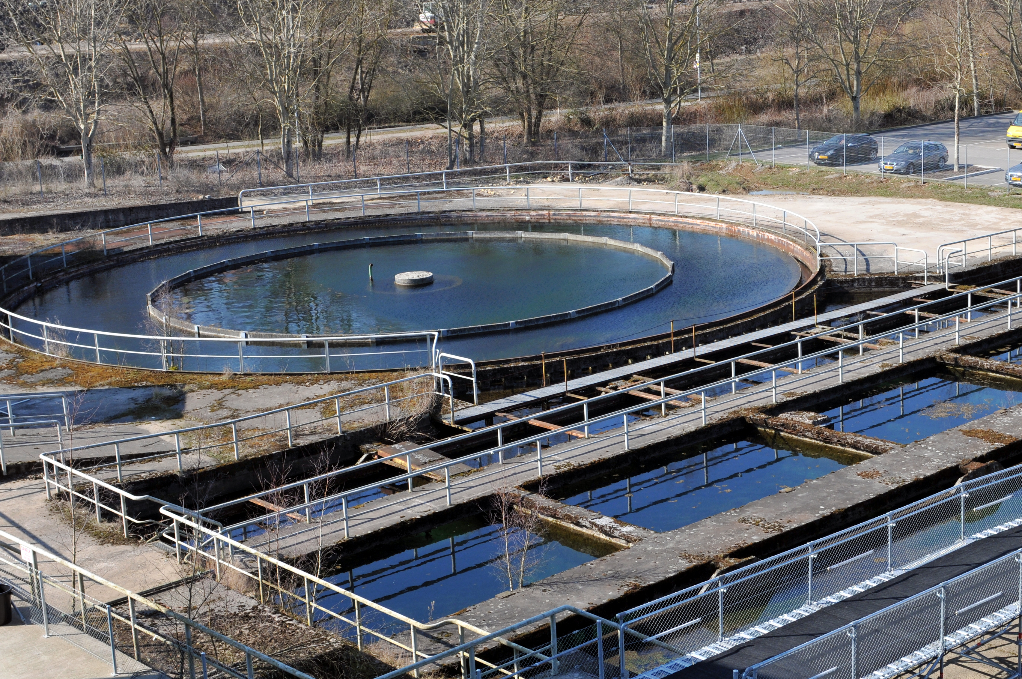 Déi fréier Killweiere vun der Diddelenger Schmelz.